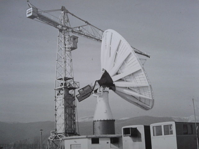 Telespazio nel Fucino: costruzione della prima antenna da 30 metri dopo la fase sperimentale